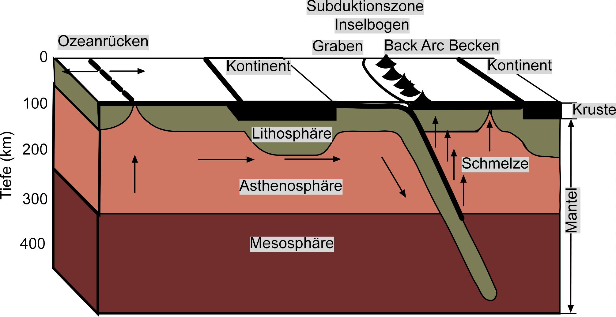 Plattentektonik, schematisch dargestellt